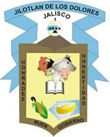 En las administraciones 1998-2000 y 2001-2003 se utilizó como escudo representativo de Jilotlán De Los Dolores, consta su uso en documentos de carácter oficial expedidos por el H. Ayuntamiento durante estas admistraciones; diseño elaborado por el M.V.Z. Efraín Licea Chávez, siendo aprobado por la administración municipal del período 1998-2000.